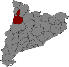 Localització del Pallars Jussà